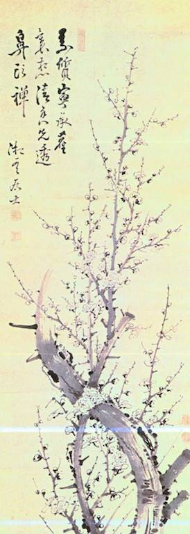 Gion Nankai Pflaumenblüte